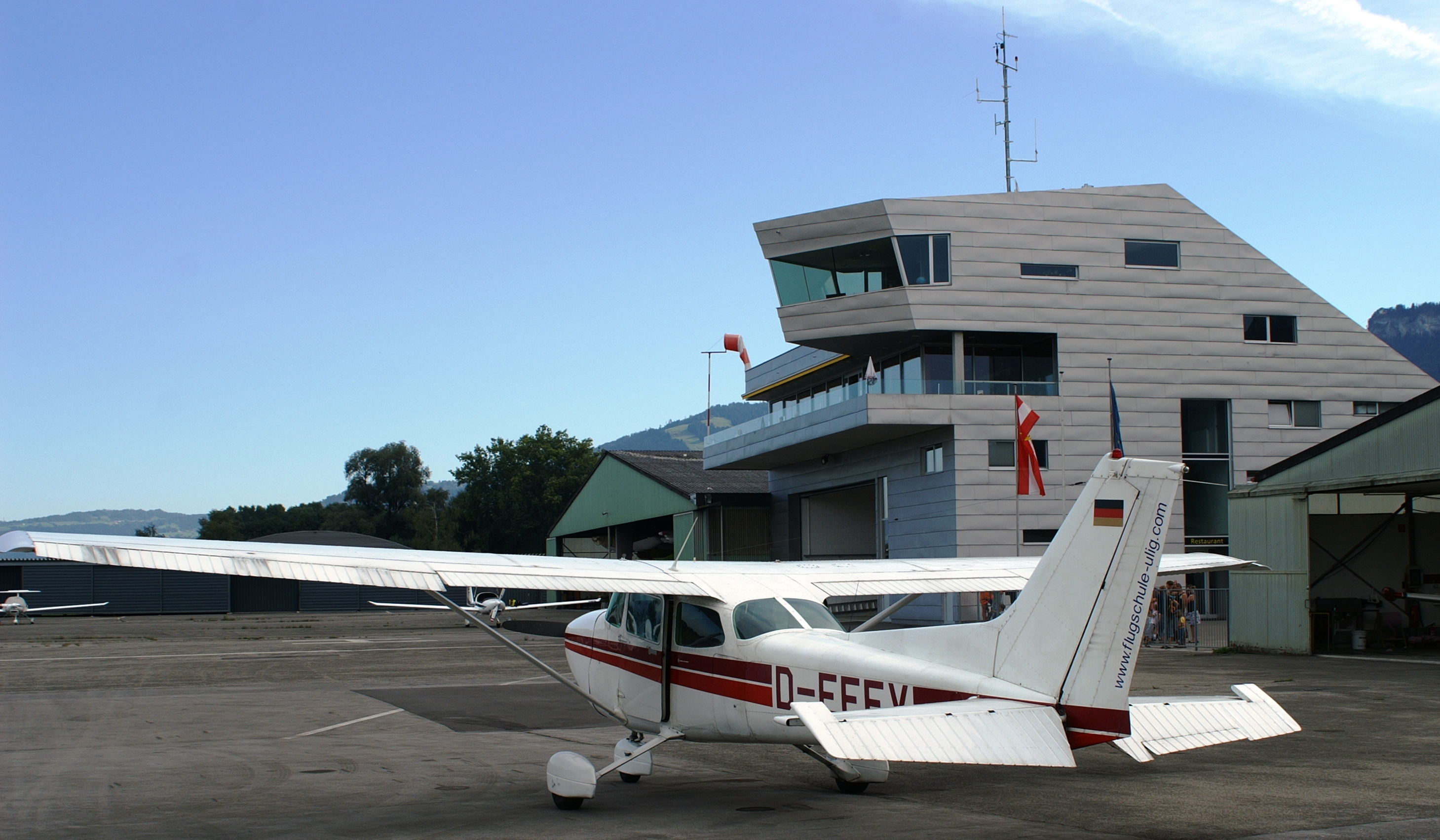 Flughafengebäude mit Tower am Flugplatz Hohenems-Dornbirn in Hohenems, Vorarlberg